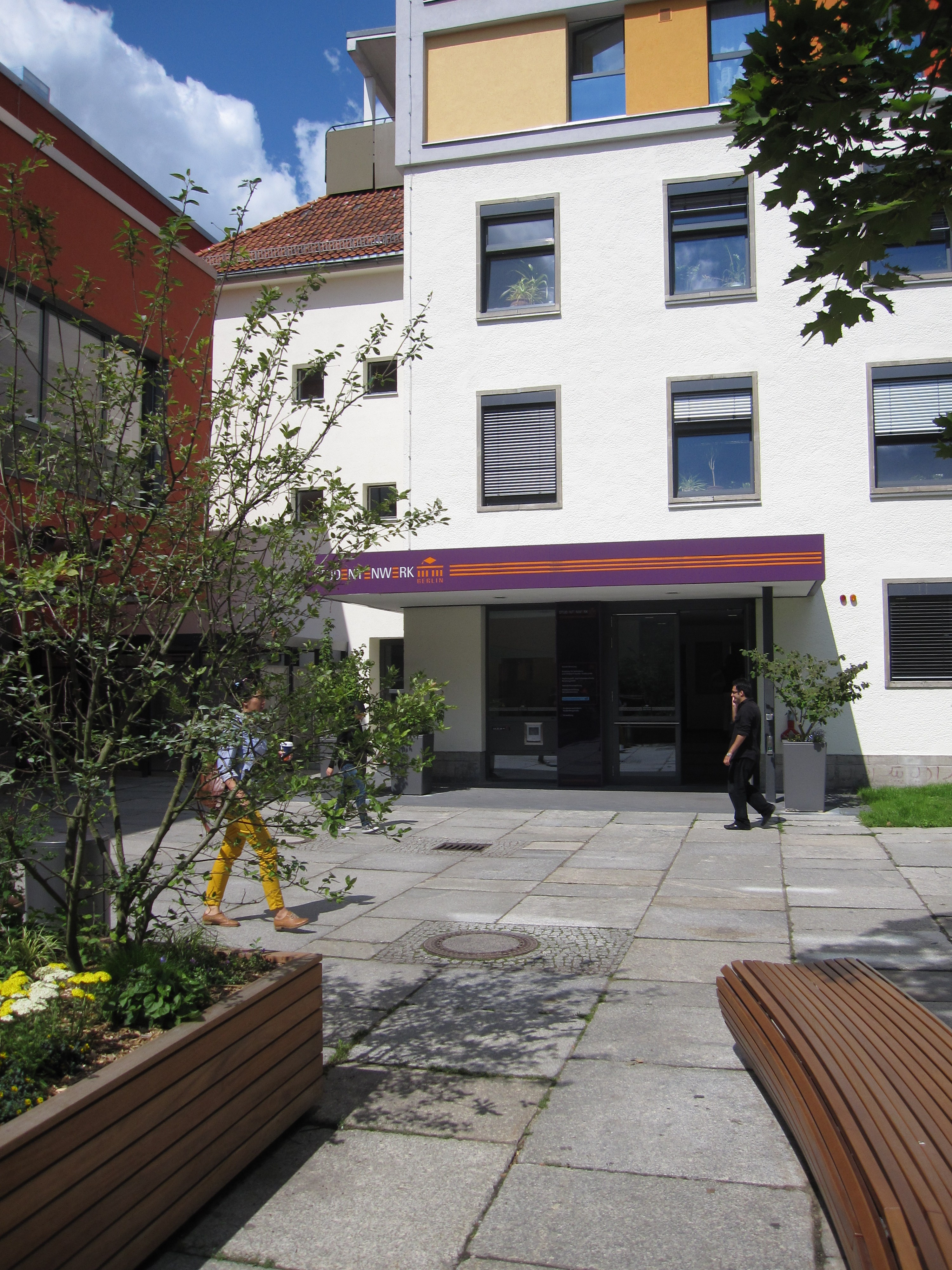 Eingangsbereich des Studentenwerks Berlin